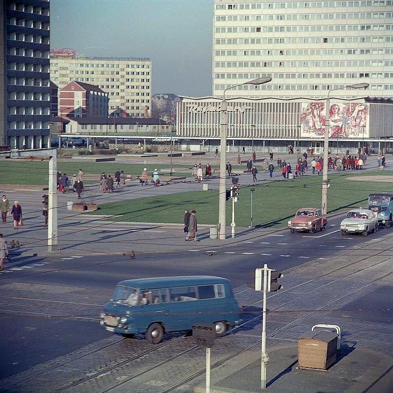 Original image description from the Deutsche FotothekFahrzeugscheiben